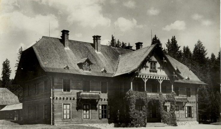 Poľovnícky zámok, ktorý postavil knieža Hohenlohe